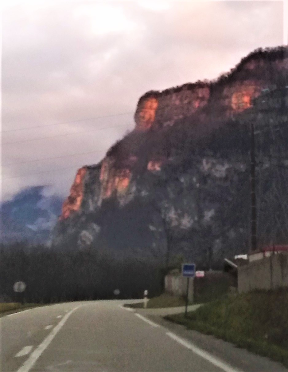 Bec de l'Échaillon en décembre 2019